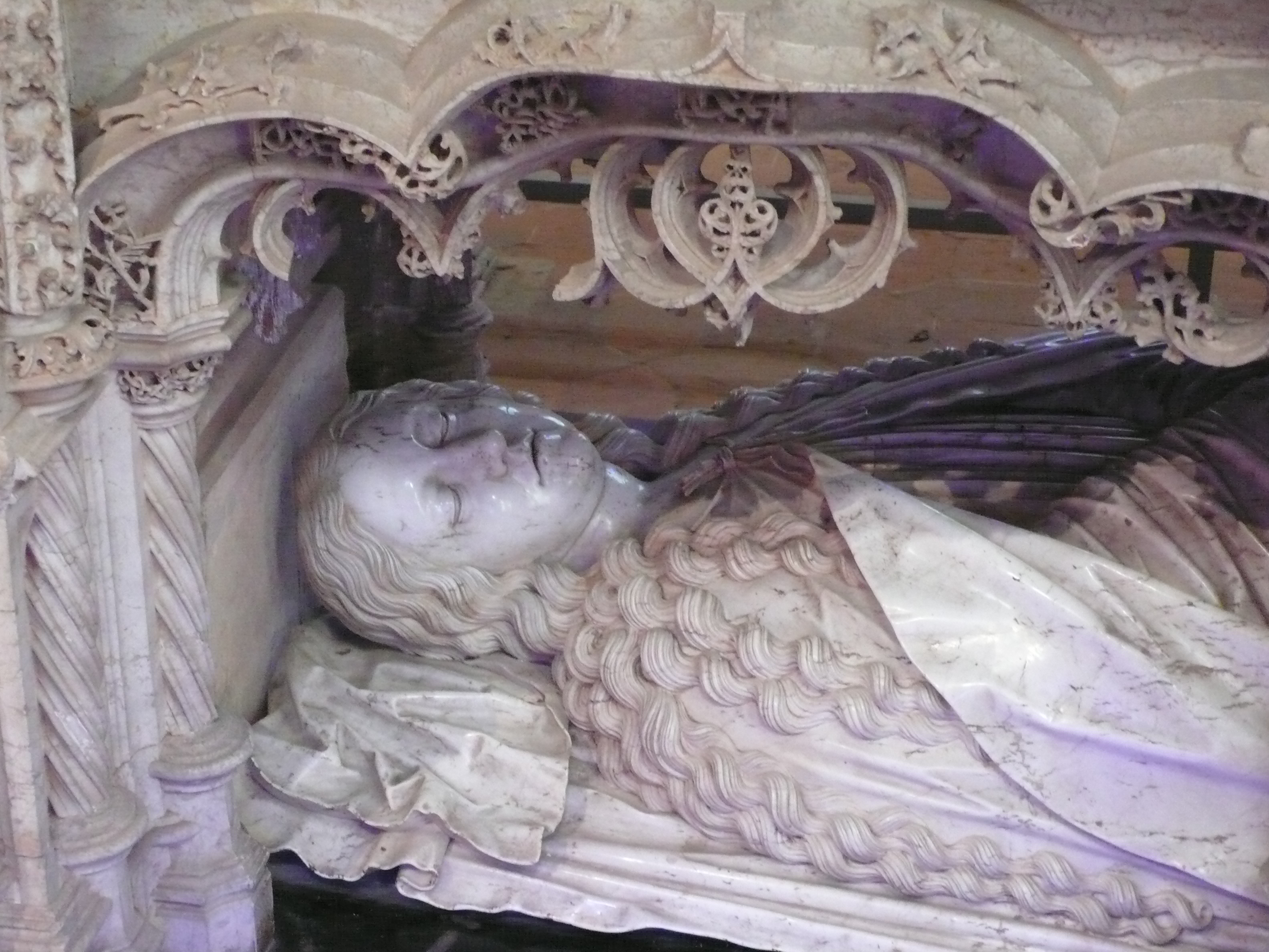 Église de Brou (Bourg-en-Bresse, Ain, France); tombeau de Marguerite d'Autriche